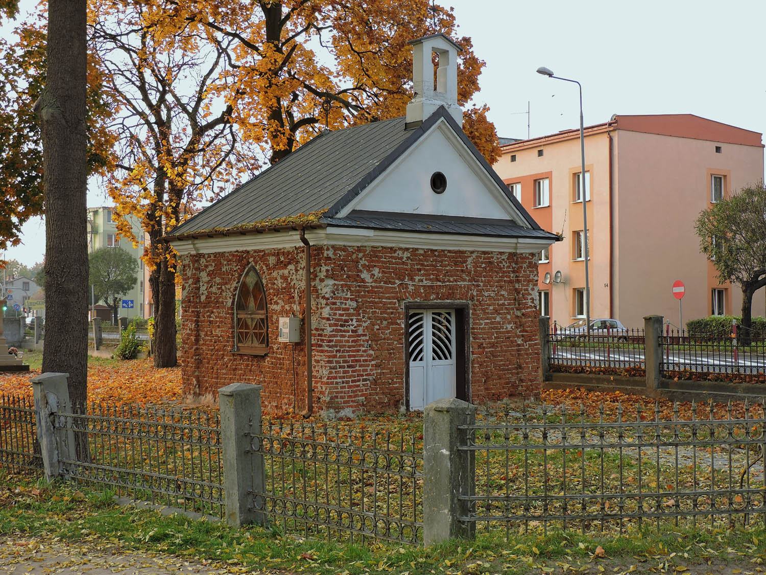 Zwoleń, kaplica pw. św. Anny, 1902